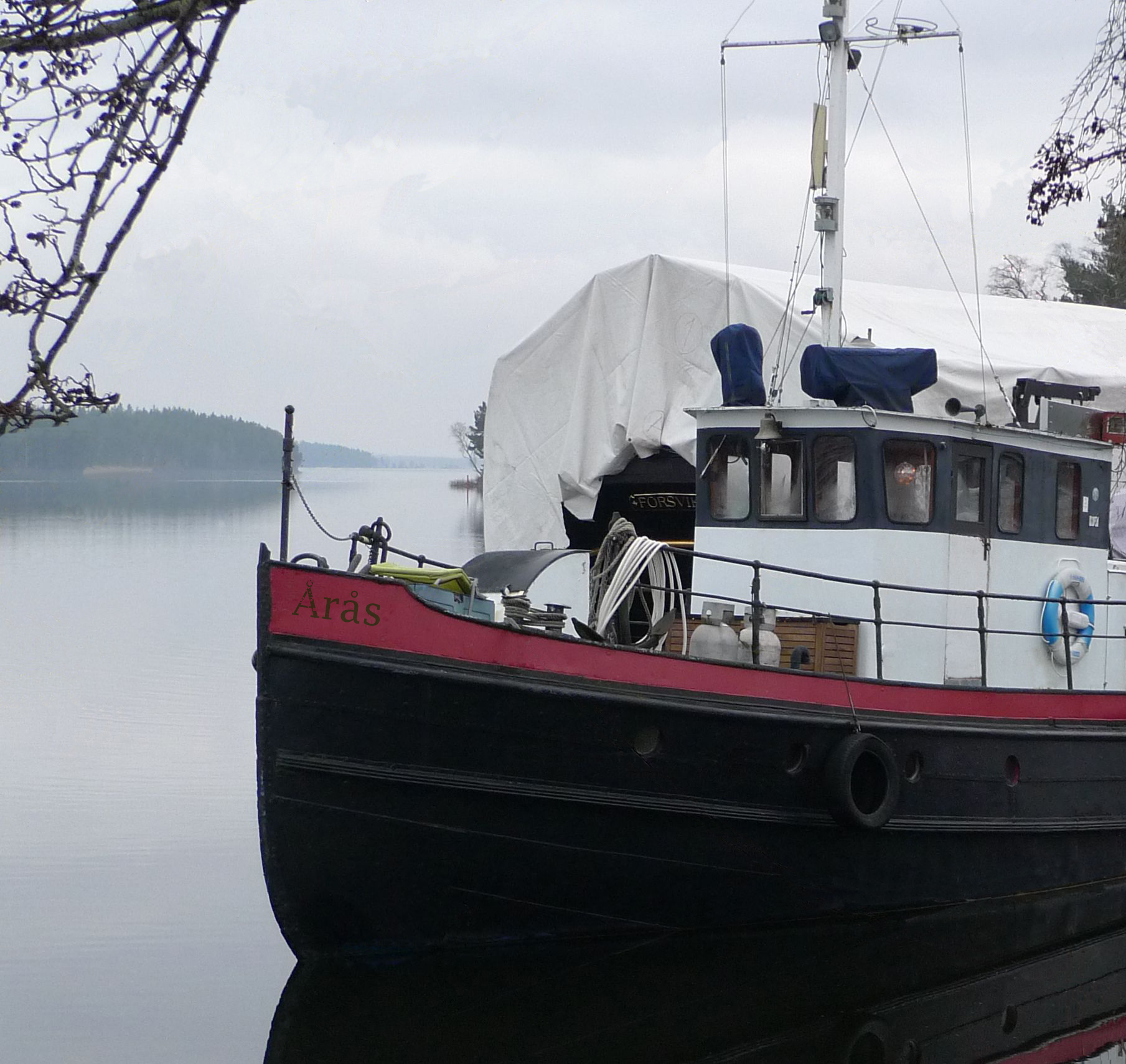 Bogserbåten Årås 2017